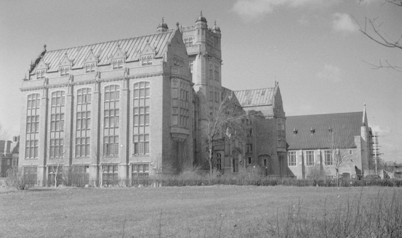 Loyola college in Montreal (1937)